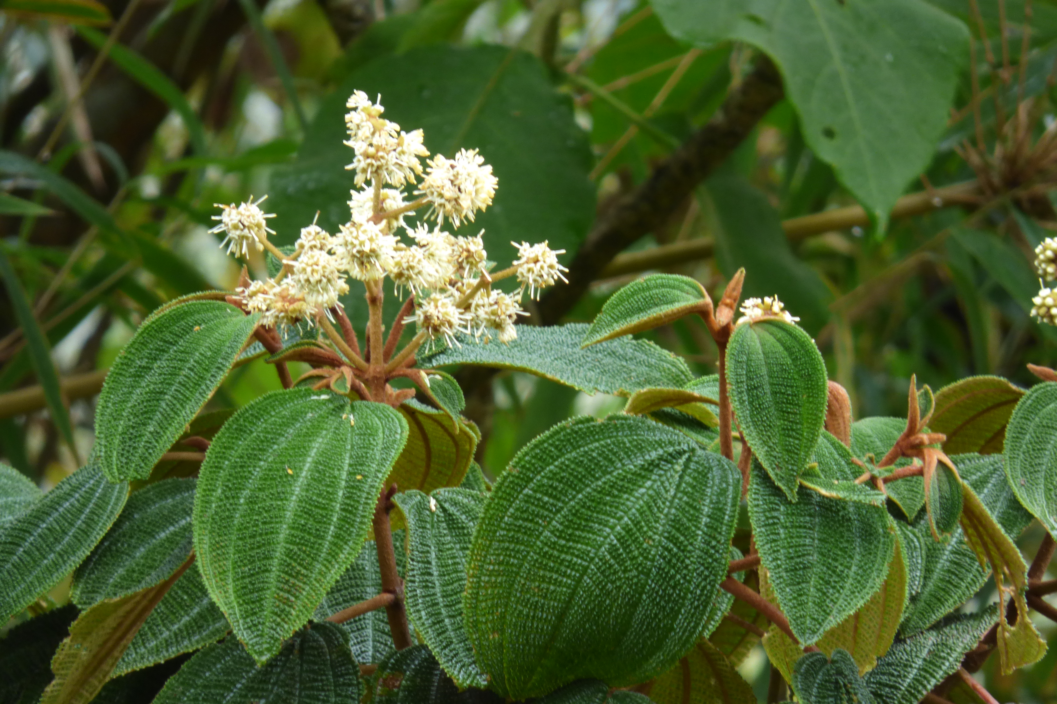 Nigüito llorón (Miconia pustulata)